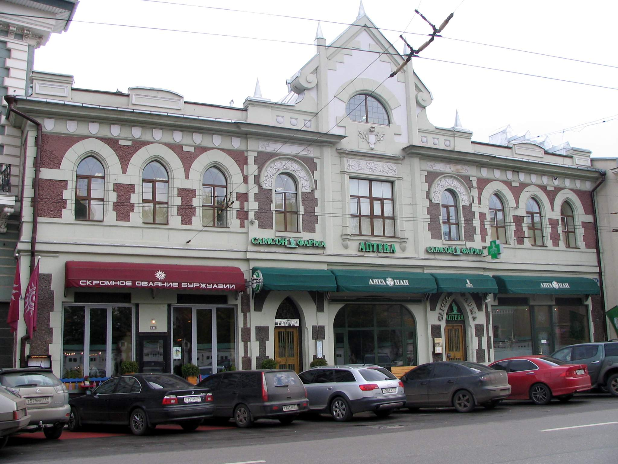 Bolshaya Lubyanka Street, 24